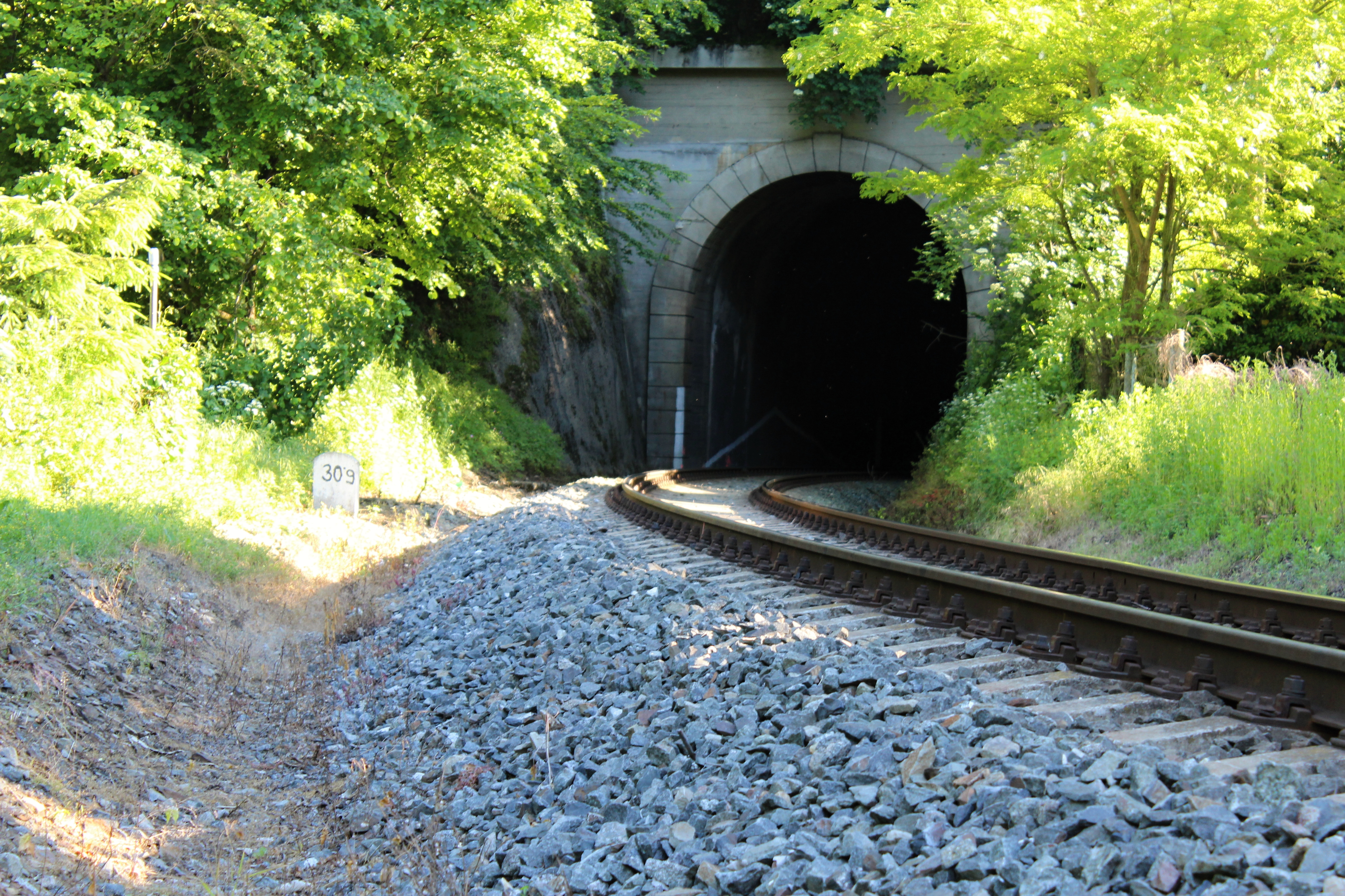 Davelský tunel z bývalé zastávky ČSD Libřice. Pohled ve směru sever-jih